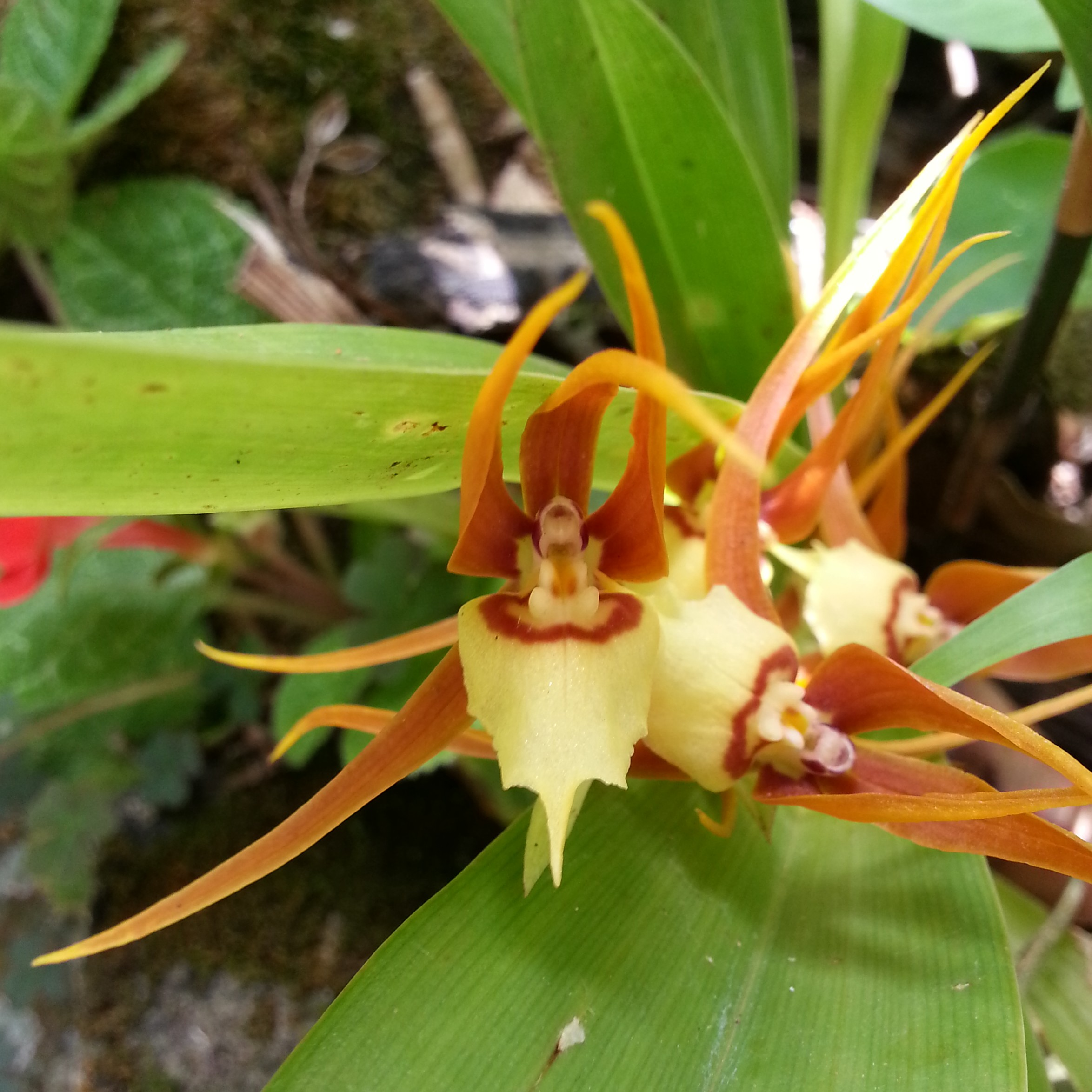 Orquídeas de Panamá